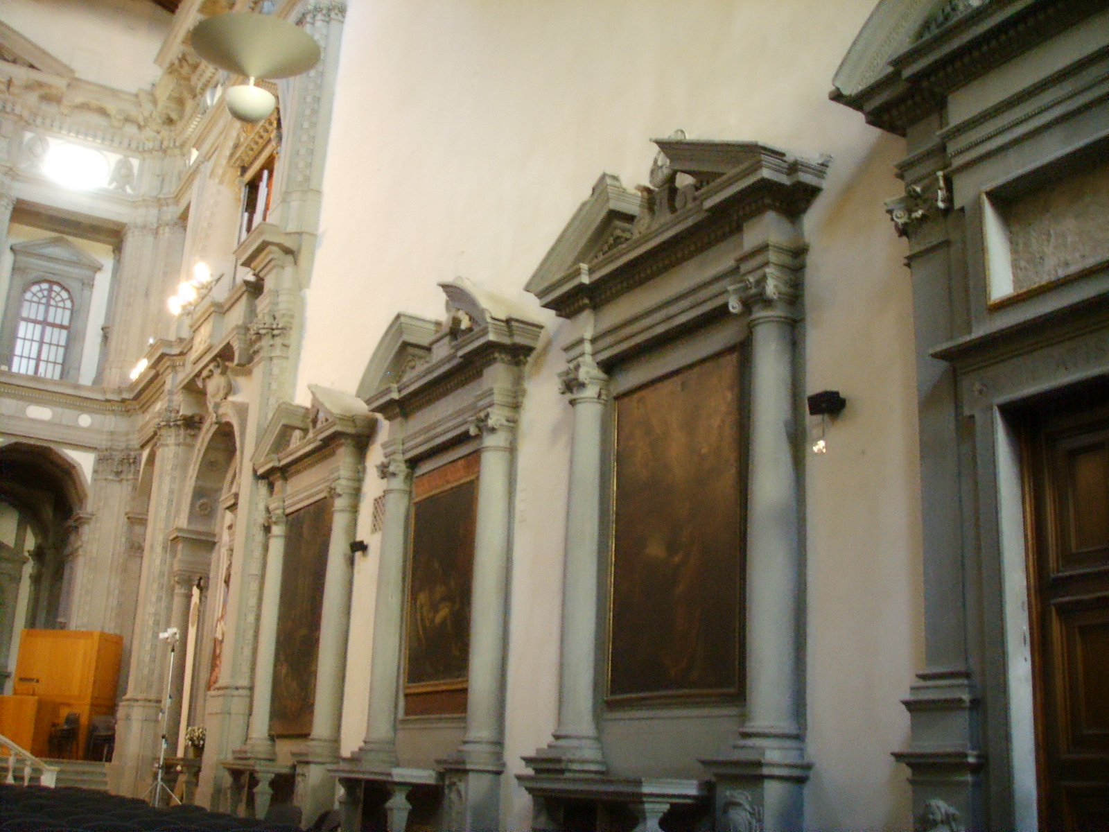 Santo Stefano al Ponte, lato destro